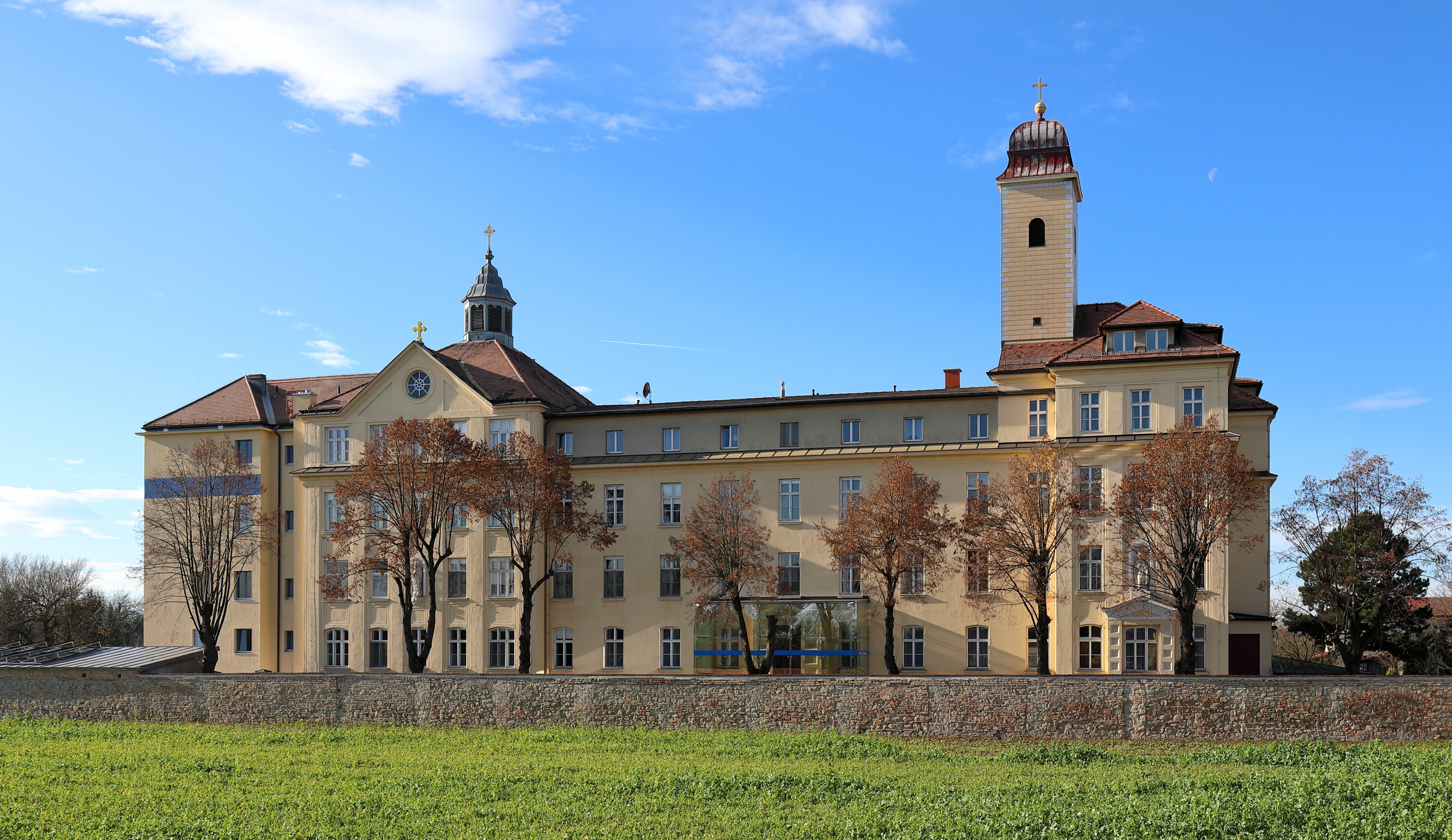 Ostnordostansicht des Klosters St. Koloman in der niederösterreichischen Stadt Stockerau.Das Kloster wurde von 1912 bis 1913 anstelle eines Vorgängerklosters von den Steyler Missionsschwestern nach den Plänen des Architekten Bruno Buchwieser errichtet. Von 1936 bis 1937 wurde das Kloster wieder mit Buchwieser um einen Nordtrakt erweitert sowie eine neue Klosterkirche errichtet und 1978 erfolgte südseitig ein viergeschossiger Zubau.